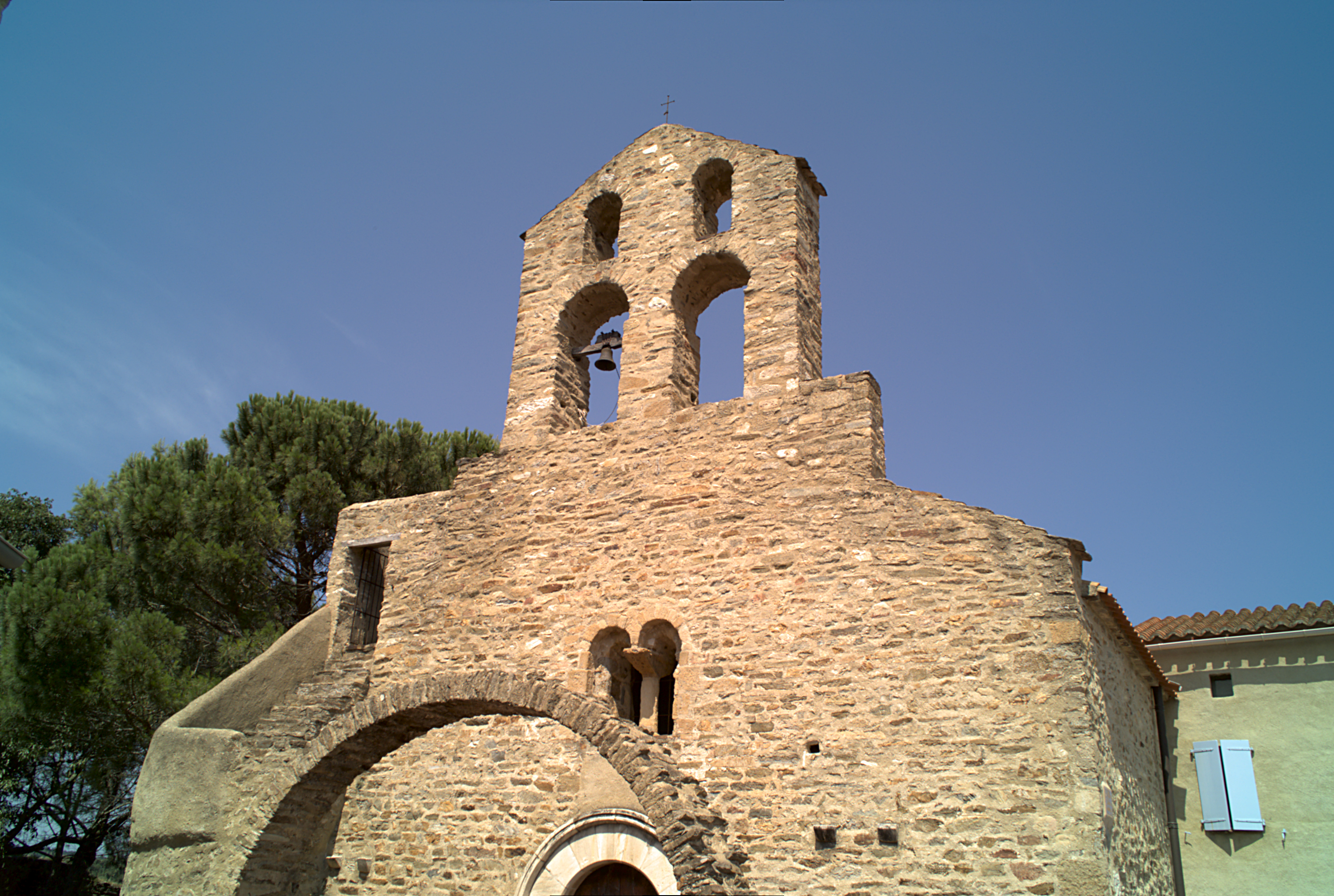 Clocher, Église Sainte-Marie de La Cluse Haute, Les Cluses (Pyrénées-Orientales, Languedoc-Roussillon, France)